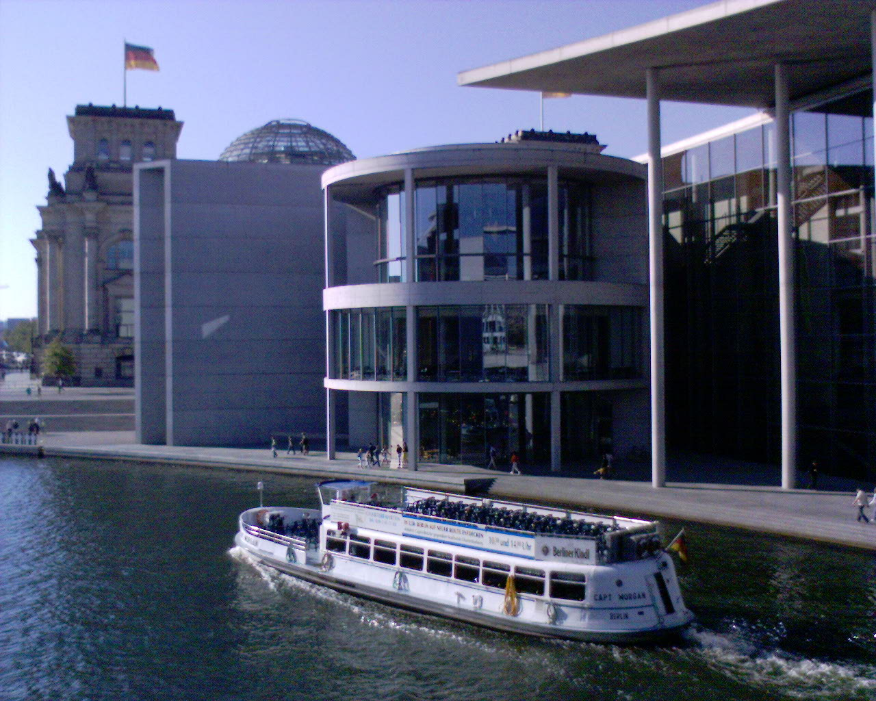 Mit 'ner Handy-Cam (Sony-Ericsson K600i) aufgenommen.Abgeordnetenhaus und Reichstag, Berlin